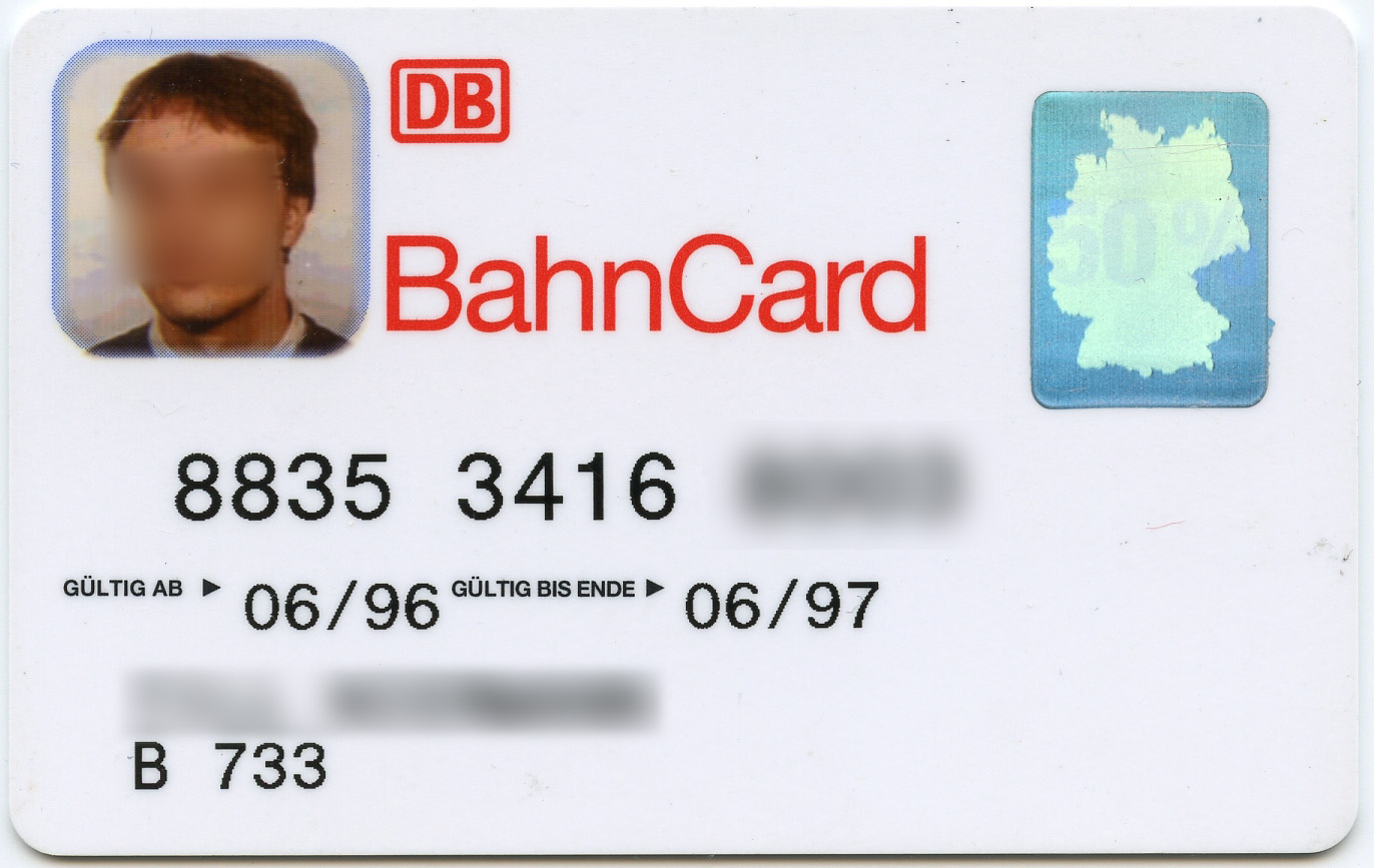 BahnCard 50 mit Gültigkeit von 06/1996 bis 06/1997